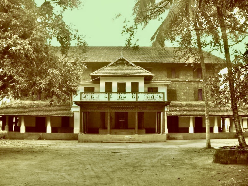 വരിക്കാശ്ശേരി മന